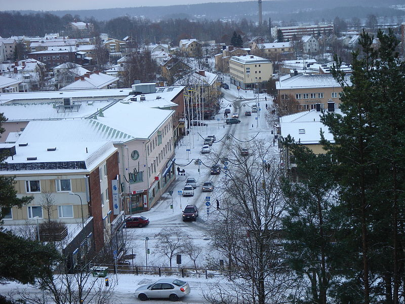 صورة للشتاء في مدينة كارلس كوغا.